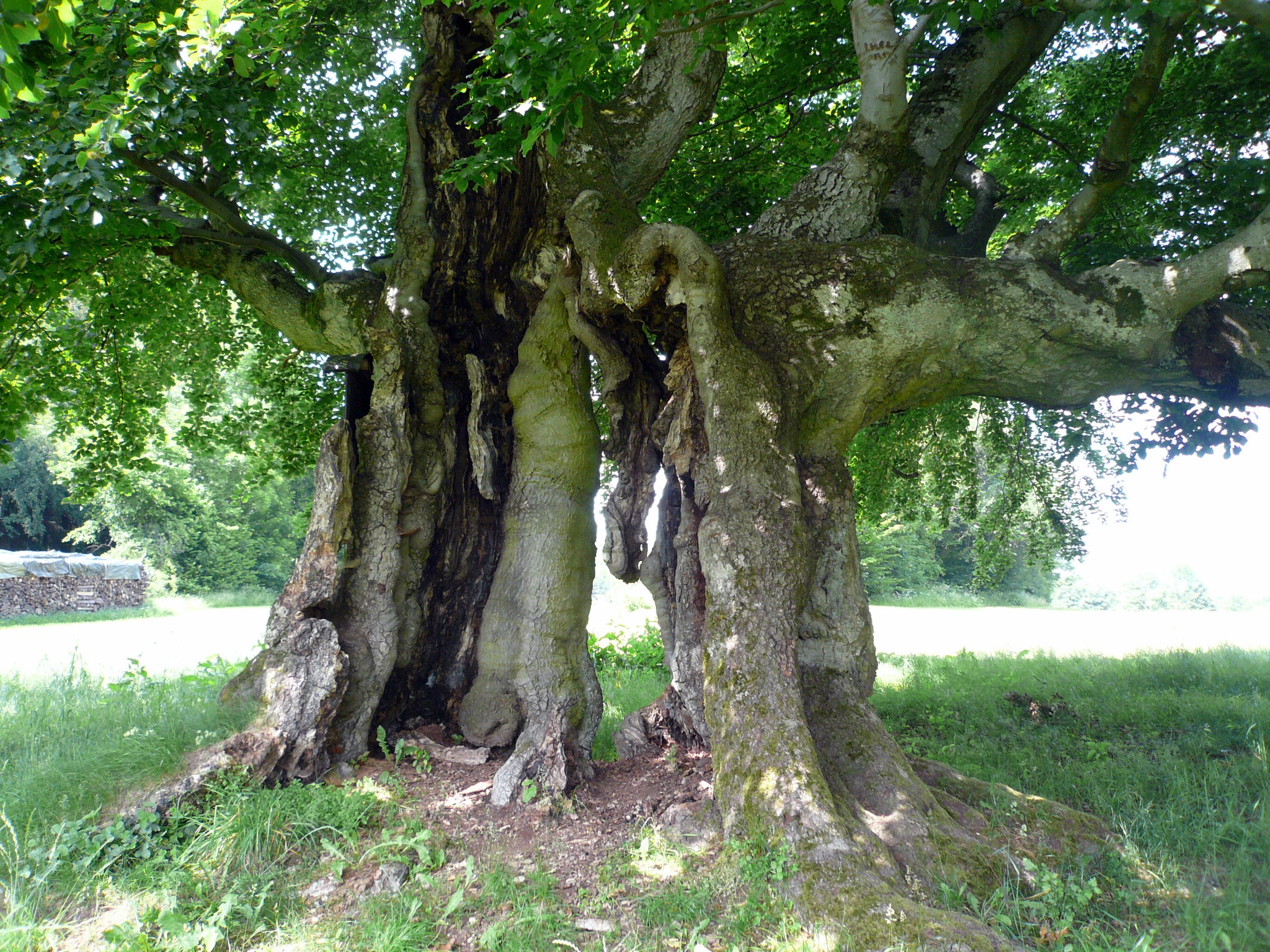 beech at Mitgenfeld, Franken